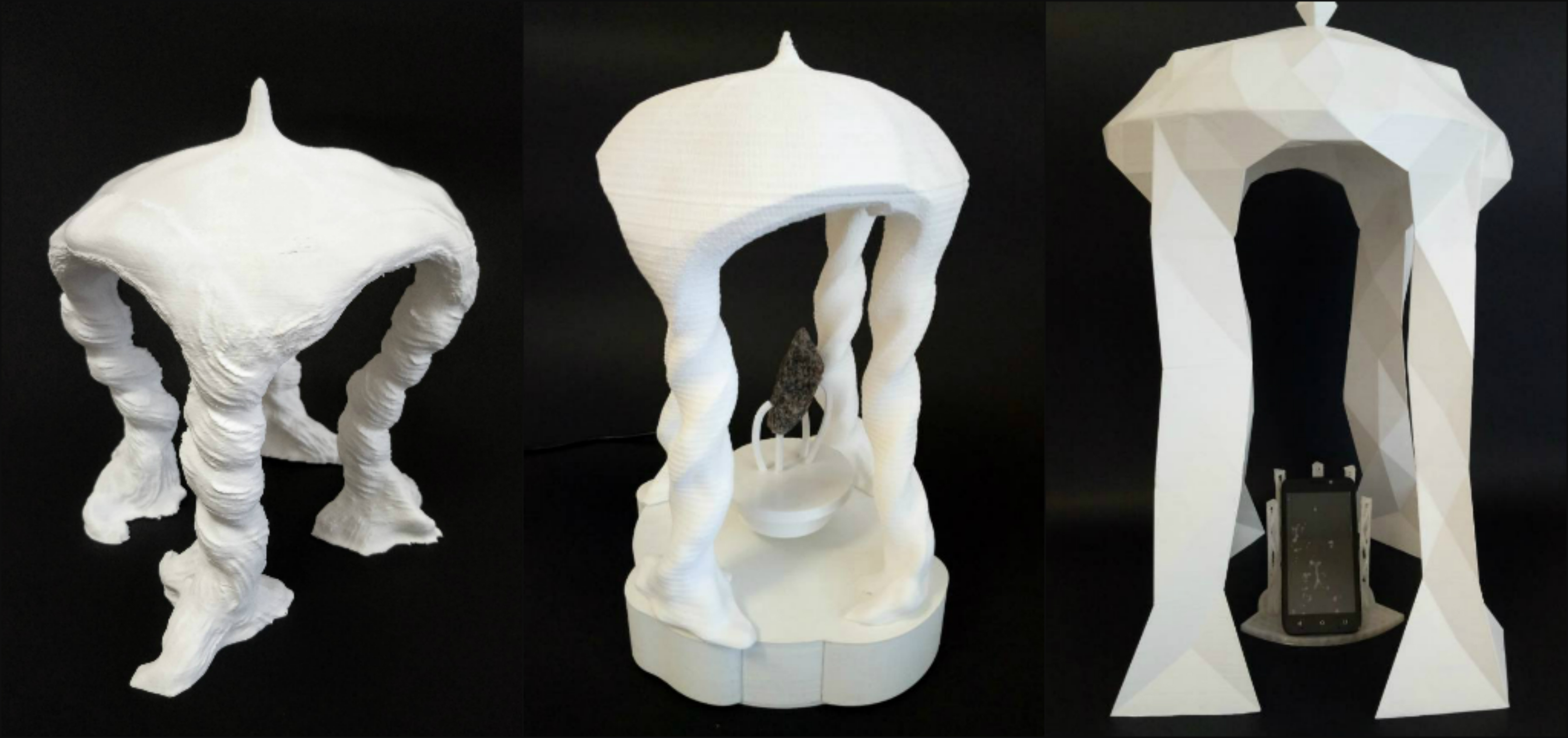 Катерина Репа Єволюція